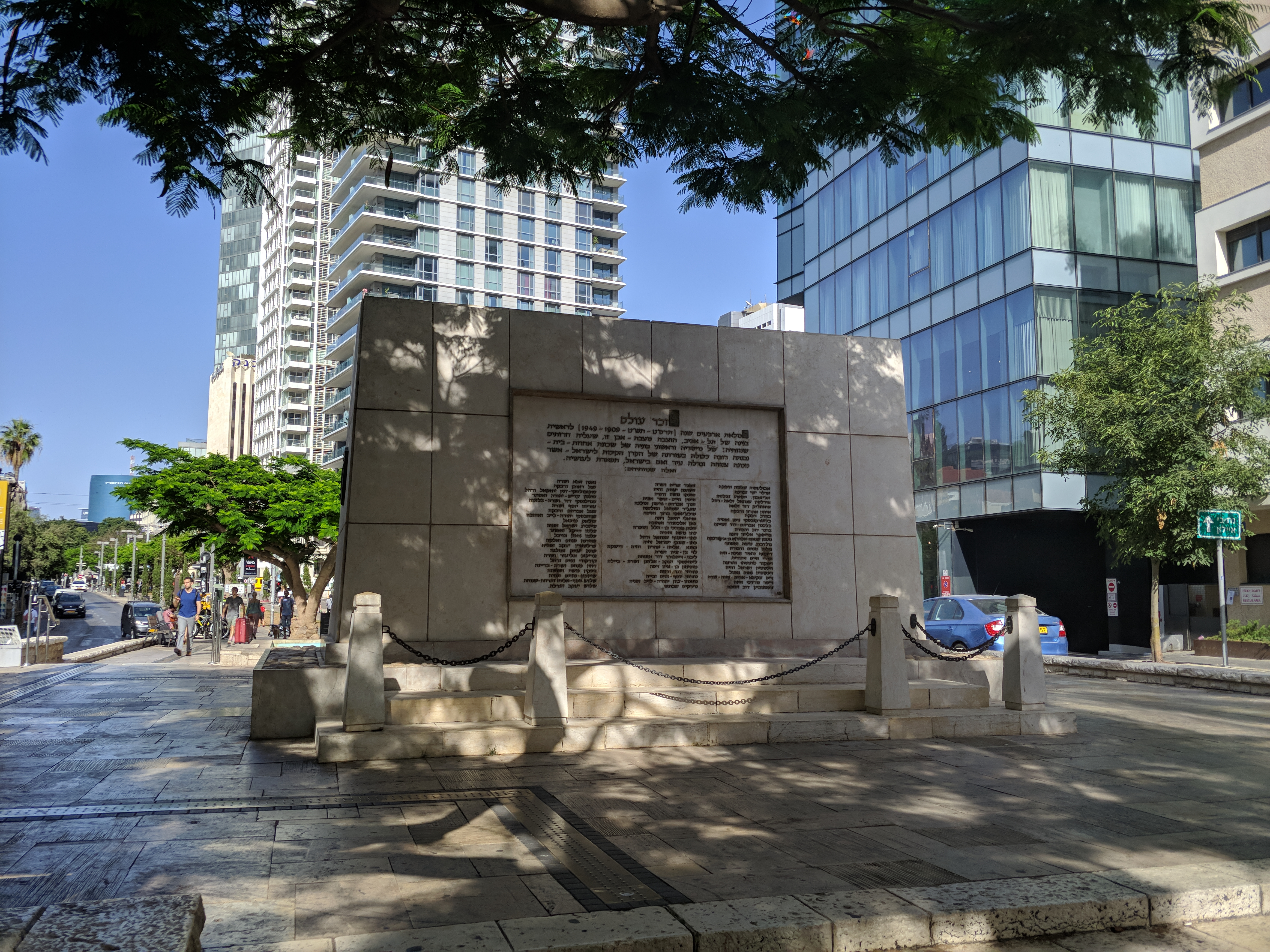 Die Rückseite des Monuments auf der sich ein Bronzerelief des Künstlers Aharon Priver befindet, das in drei Schichten die verschiedenen Stadtentwicklungsphasen im Laufe der Zeit darstellt.